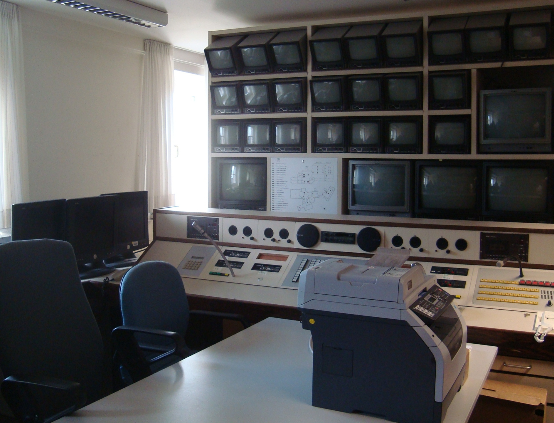 Überwachungszentrale im ehemaligen Gästehaus der Bundesregierung Petersberg